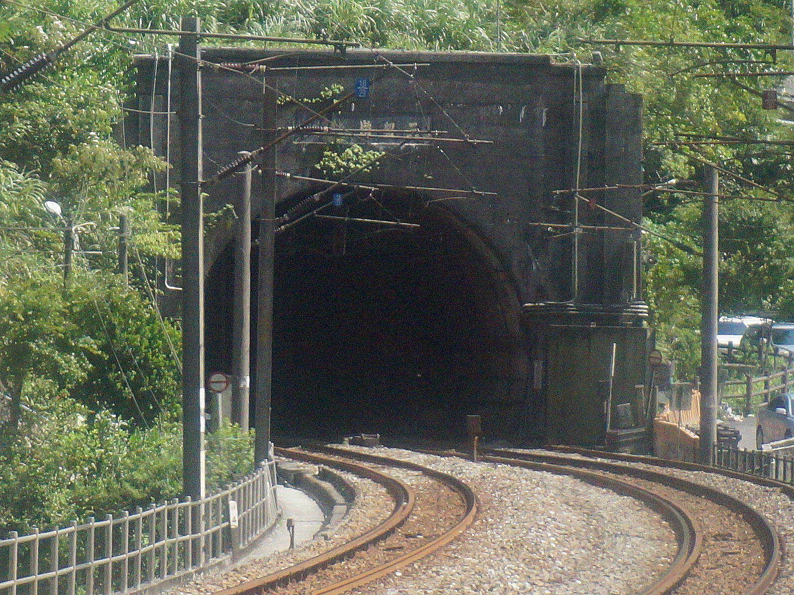 從臺灣鐵路管理局平溪線往瑞芳車站列車遠望三貂嶺隧道北口。